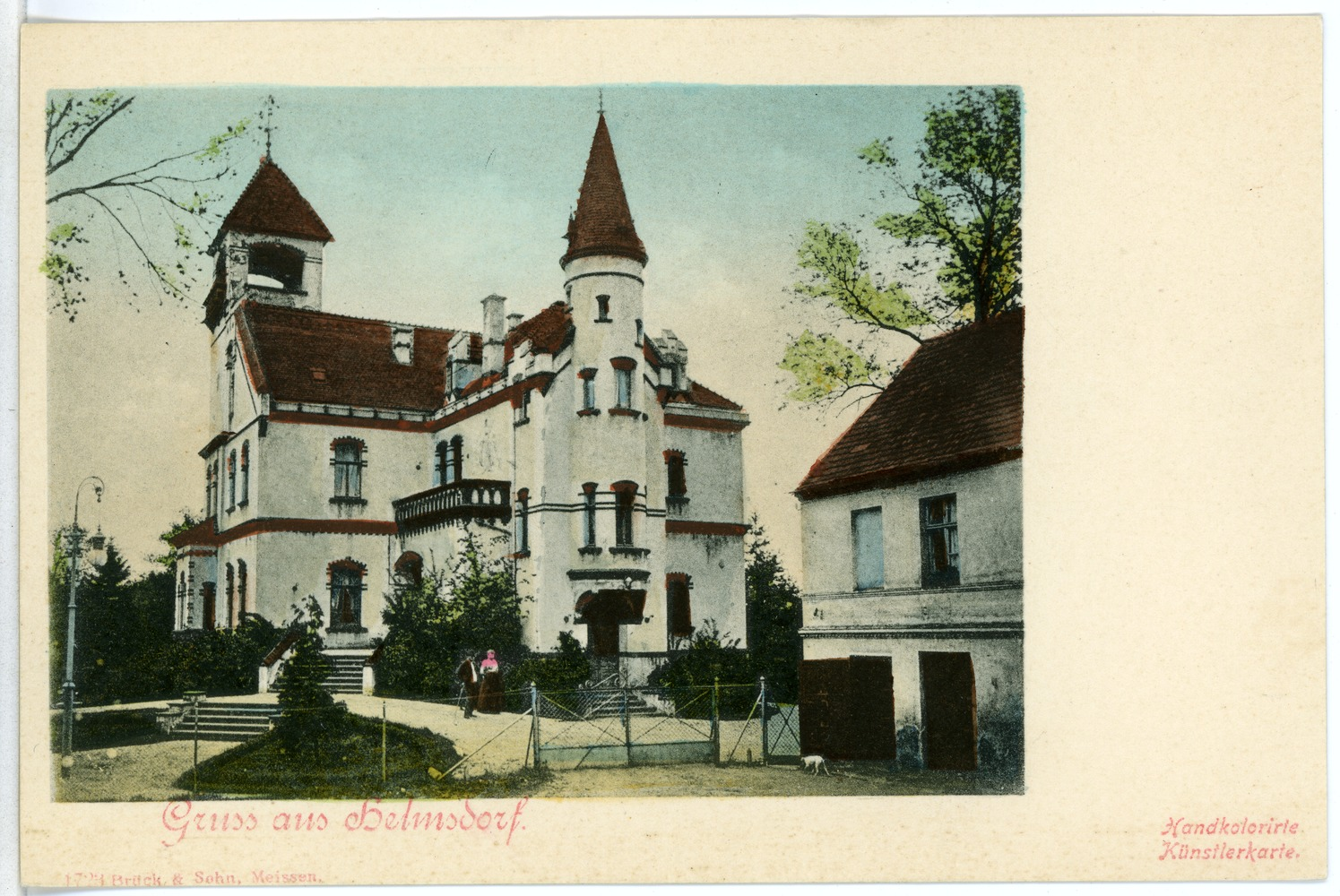 Helmsdorf; Schloß This postcard is from publisher Brück & Sohn in Meißen ( This postcard has a unique number 01723 and is available in a higher resolution at the publisher. This images was uploaded in a cooperation project between Wikipedians and the publisher.